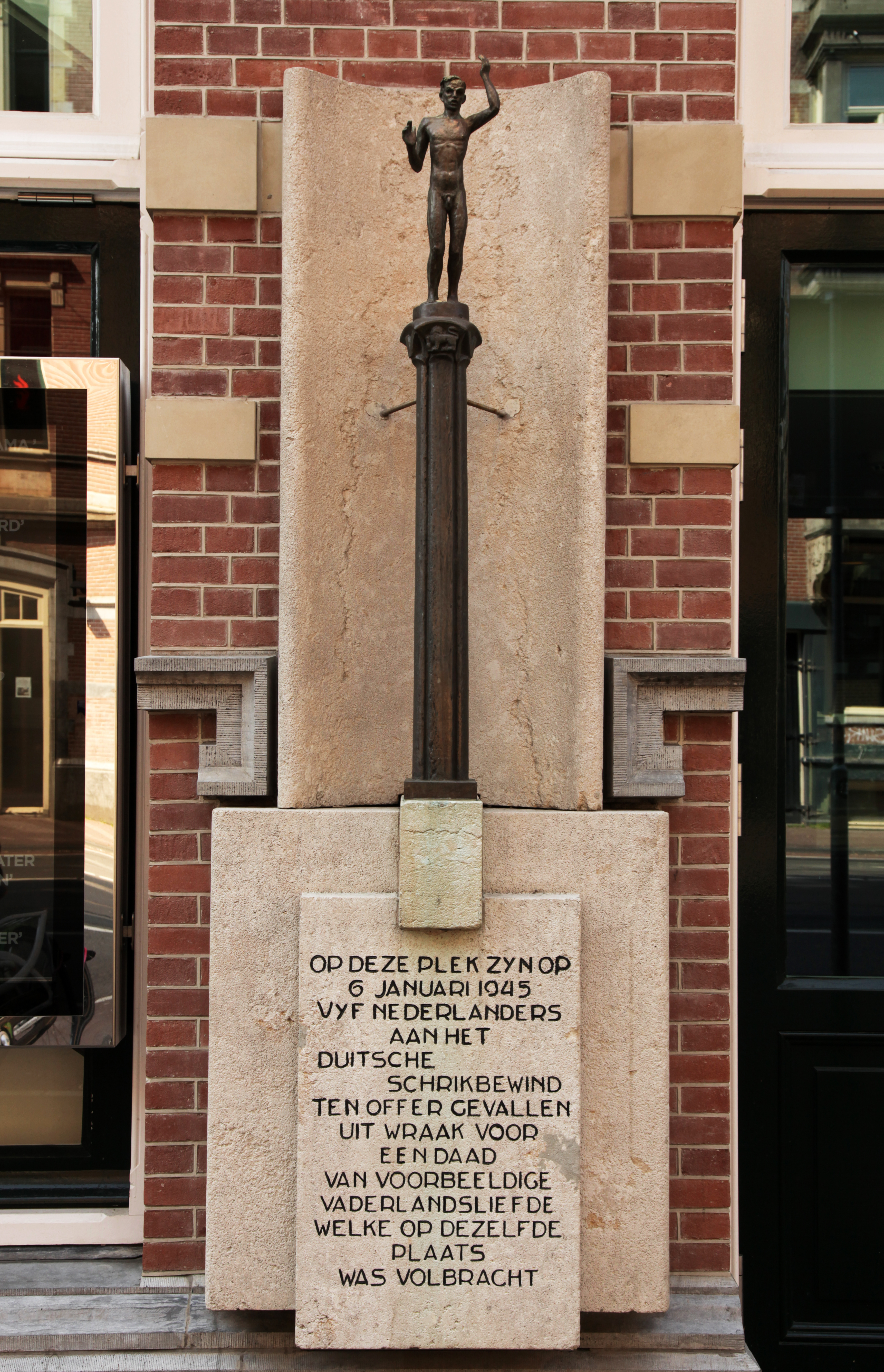 Sculptuur van Hildo Krop (1884-1970)